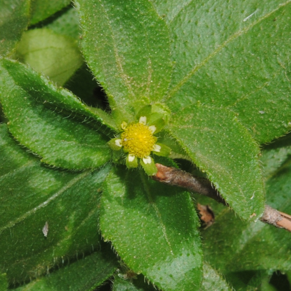 Jaegeria hirta. Asteraceae. Fotos tomadas bajo monte de pinos en ladera del Cerro Buena Vista, departamento de Rivera, Uruguay.